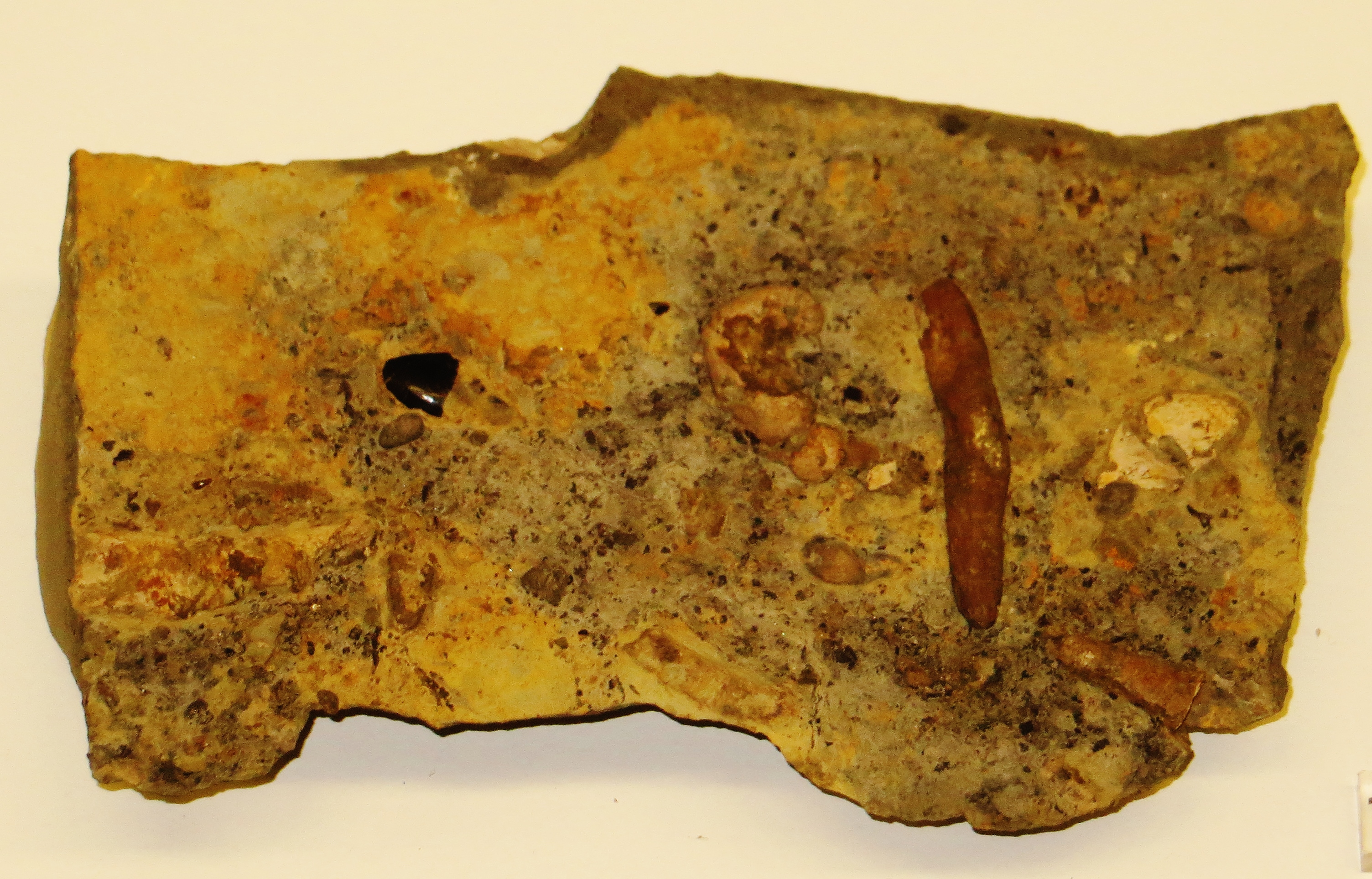 Took the picture at Muschelkalkmuseum Ingelfingen